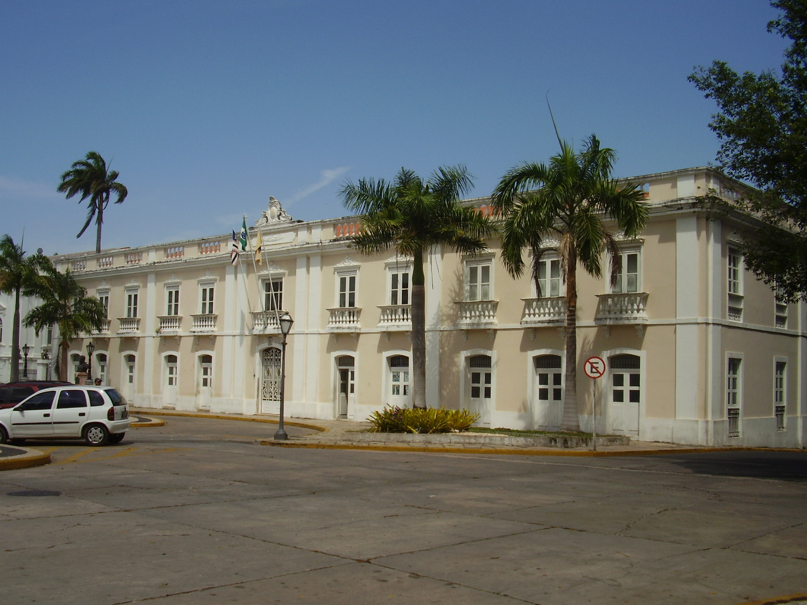 Prefeitura de São Luís, Maranhão, Brasil.